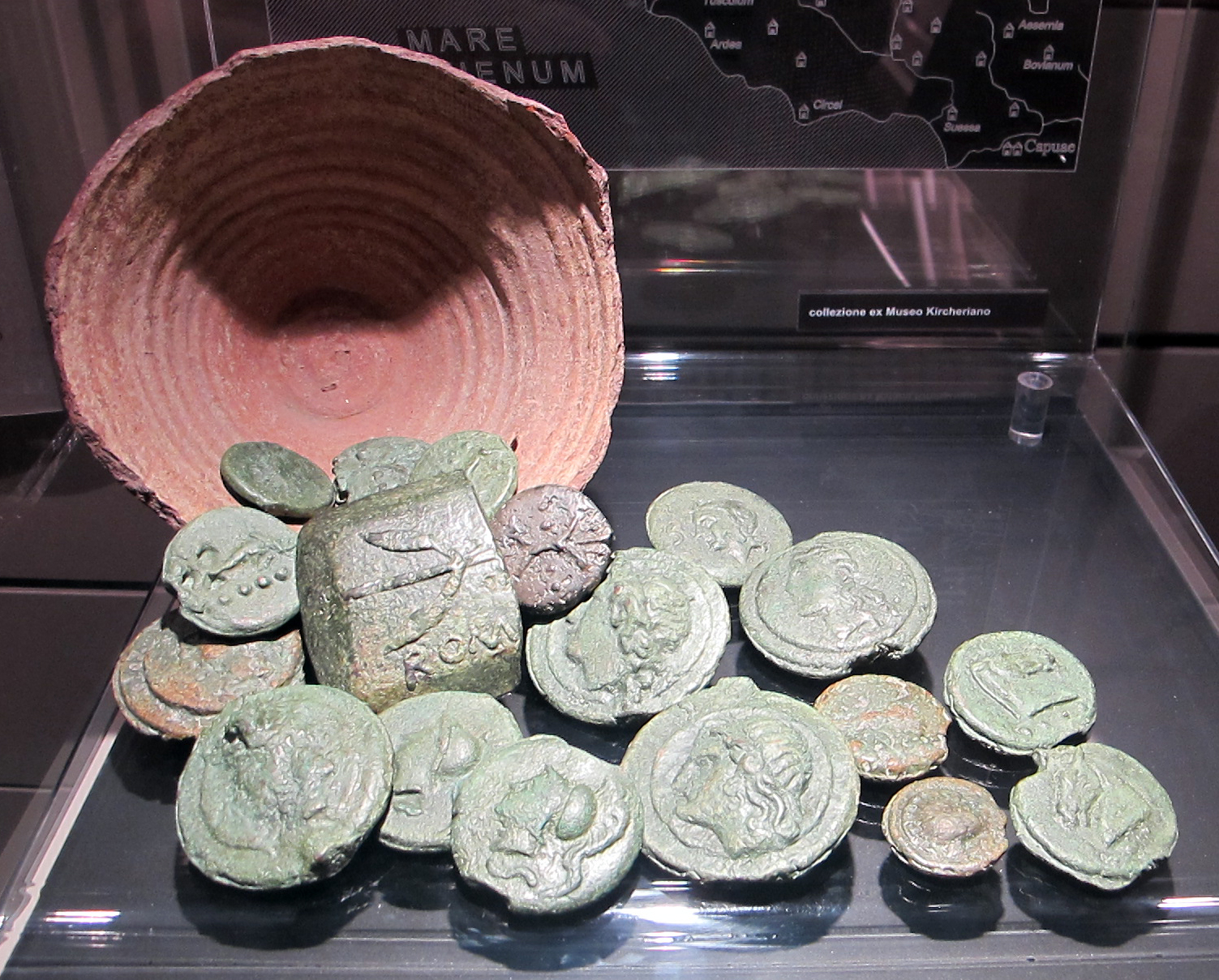 Palazzo Massimo alle Terme